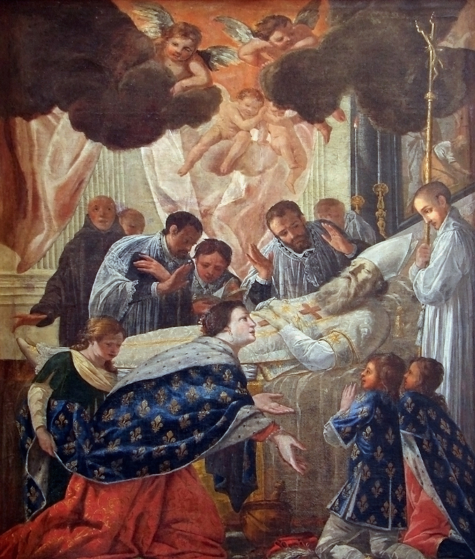 Sainte Bathilde aux pieds de Saint Eloi mort (La reine Bathilde, qui vivait au 7ème siècle, porte ici le costume du 17ème siècle, allusion à Anne d'Autriche alors aux prises avec la Fronde, en signe de loyalisme du commanditaire.)